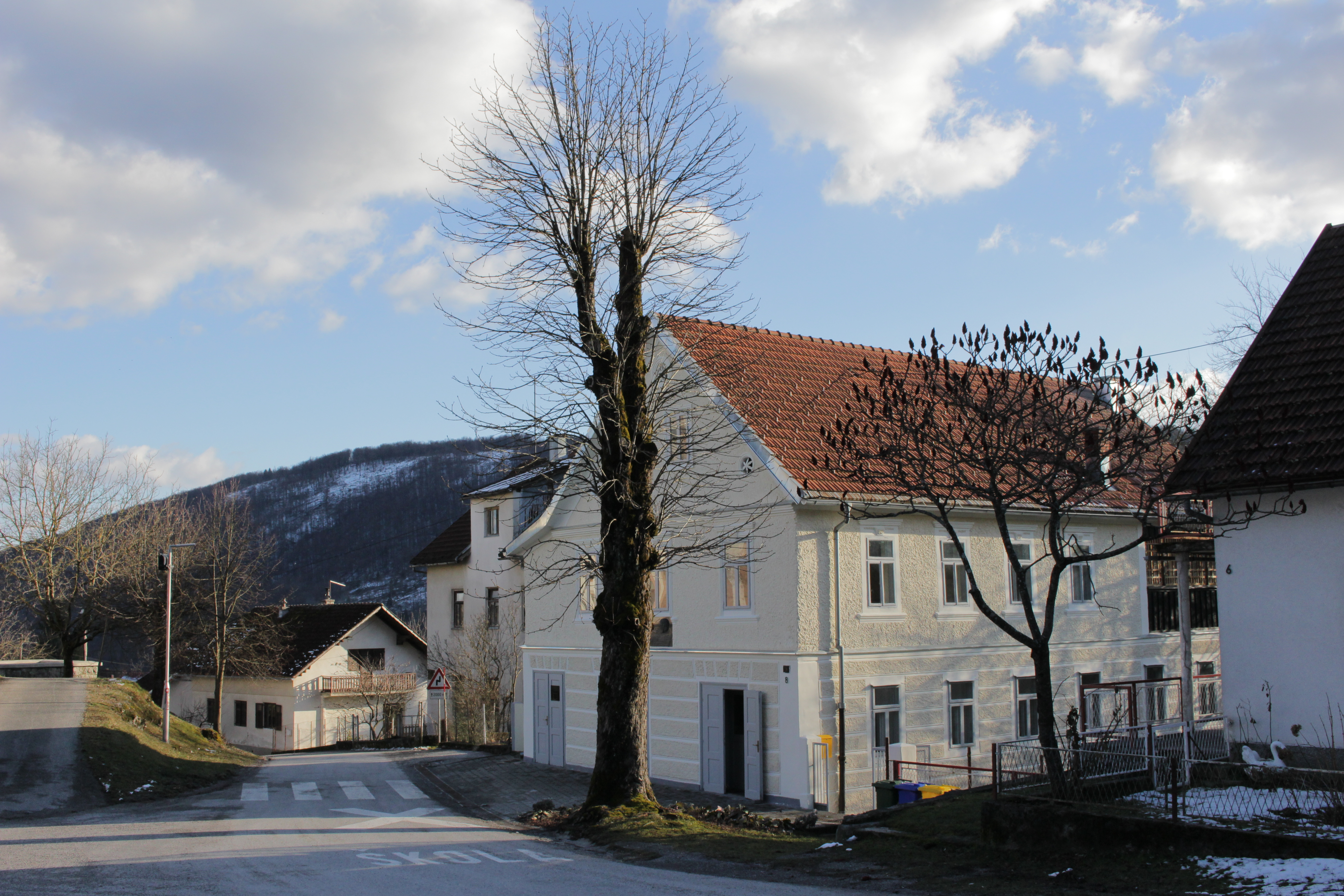 književnikova kuća